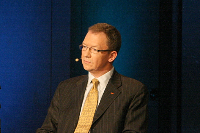 Idar Kreutzer, Storebrand-leder. Fra NHOs Årskonferanse 2009.